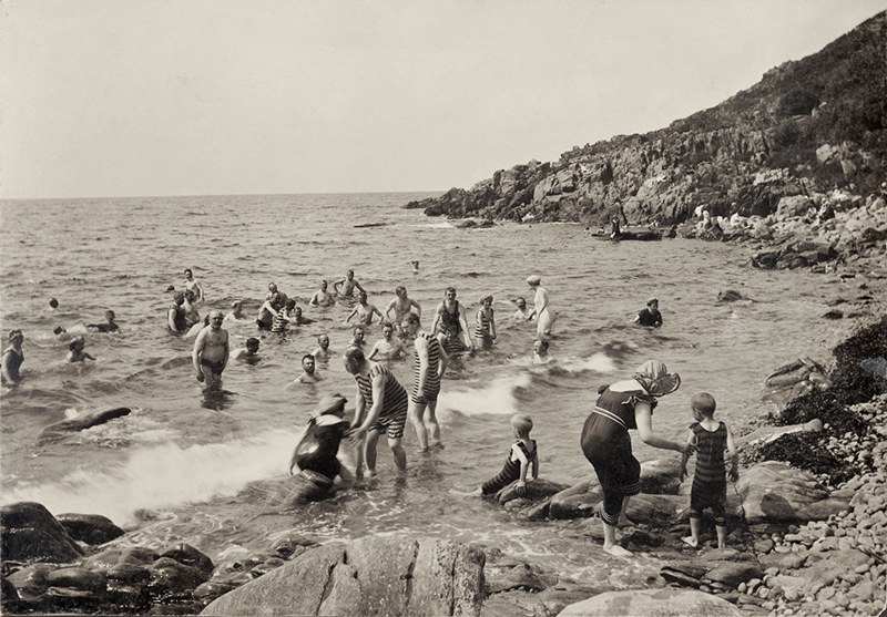 Havsbadorten Ransvik vid Mölle ca 1910.